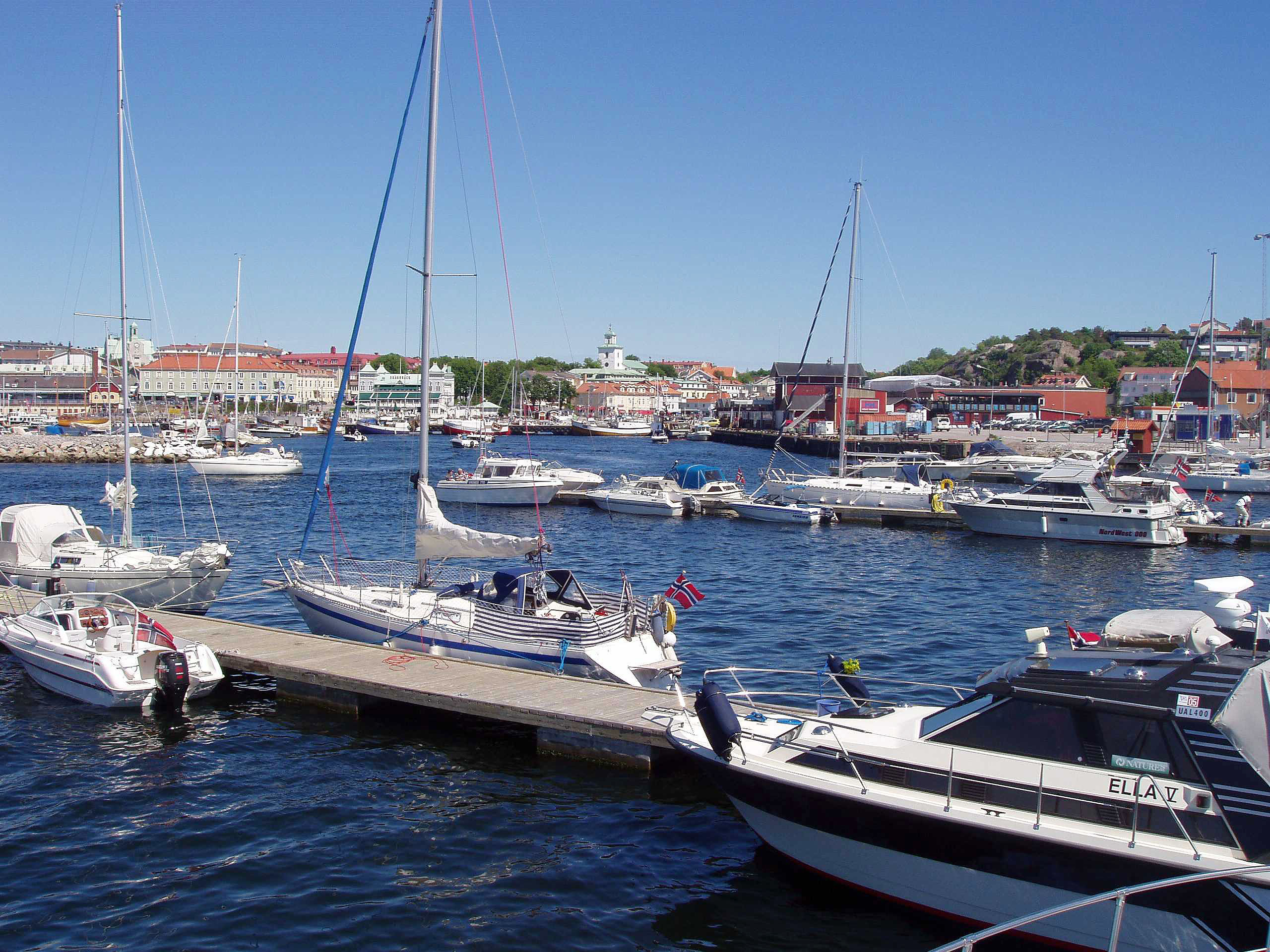 Strömstads hamn och marina.